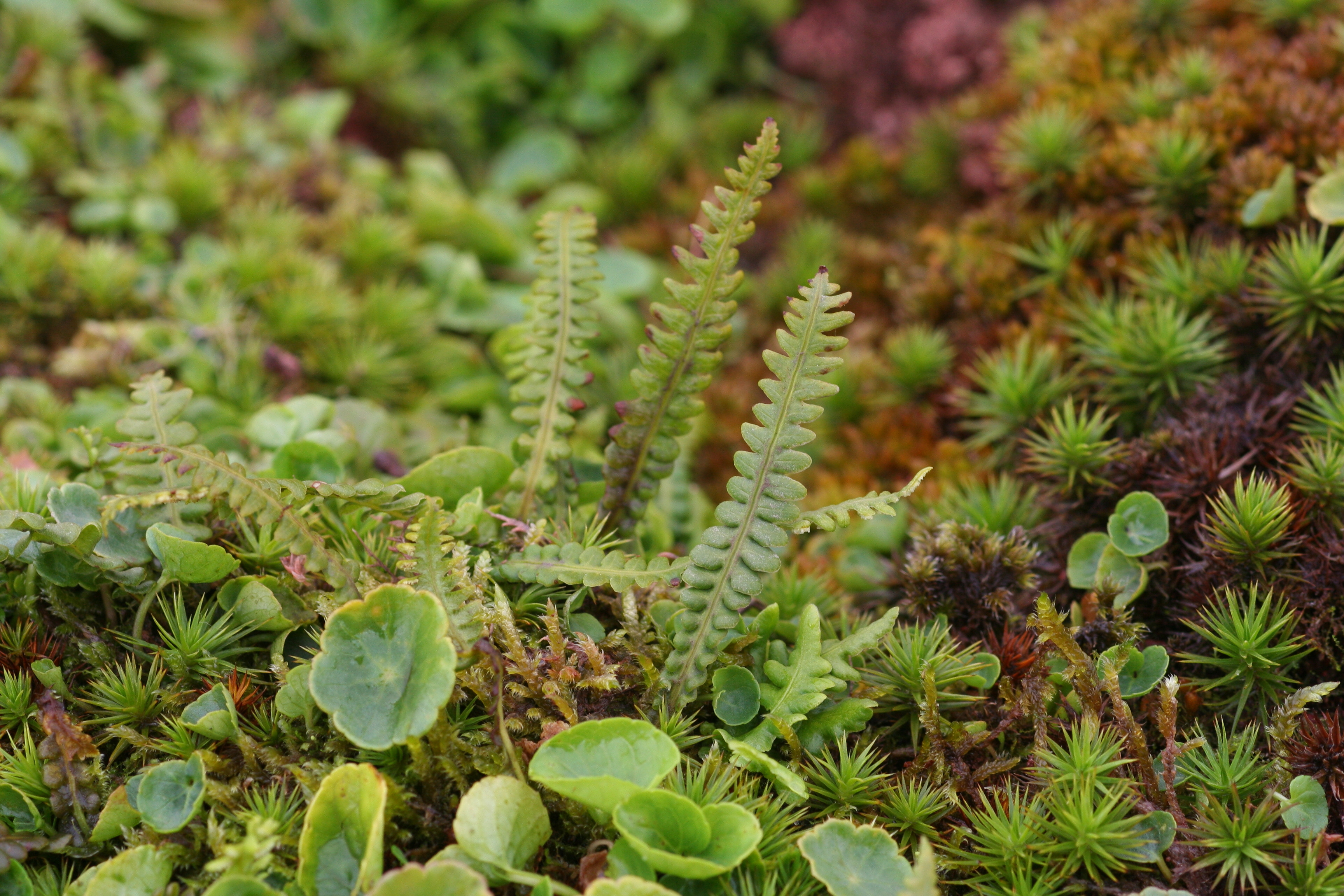 Källkambräken - Blechnum spicant var.fallax0125